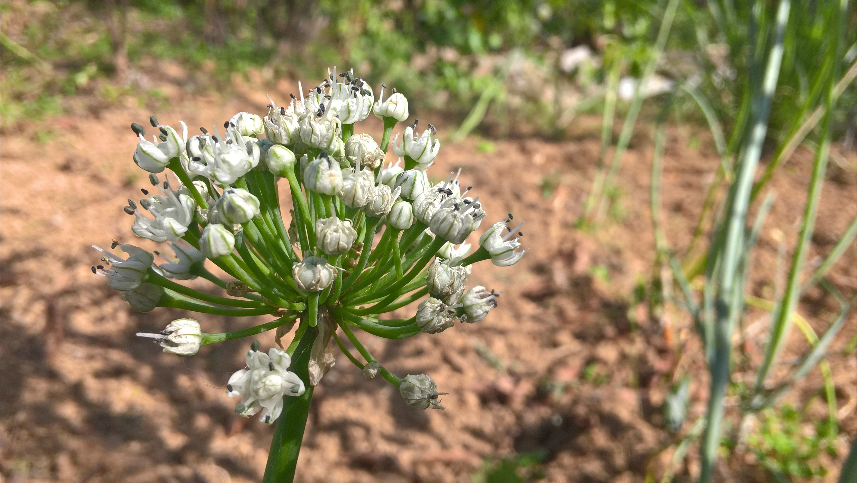 नेपाली: प्याजको फूल